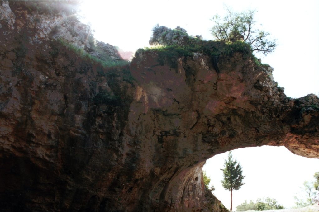 Arheološki lokalitet Vela spila pored Vele Luke na krajnje zapadnom djelu otoka Korčule